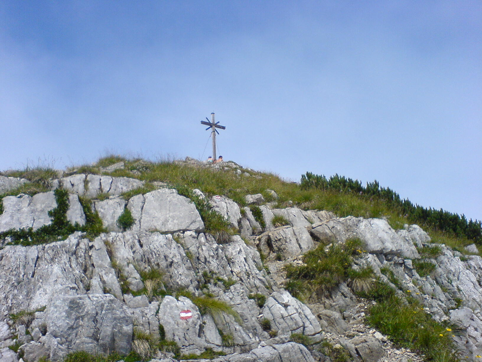 Aufstieg zur Aiplspitz auf der Südroute.